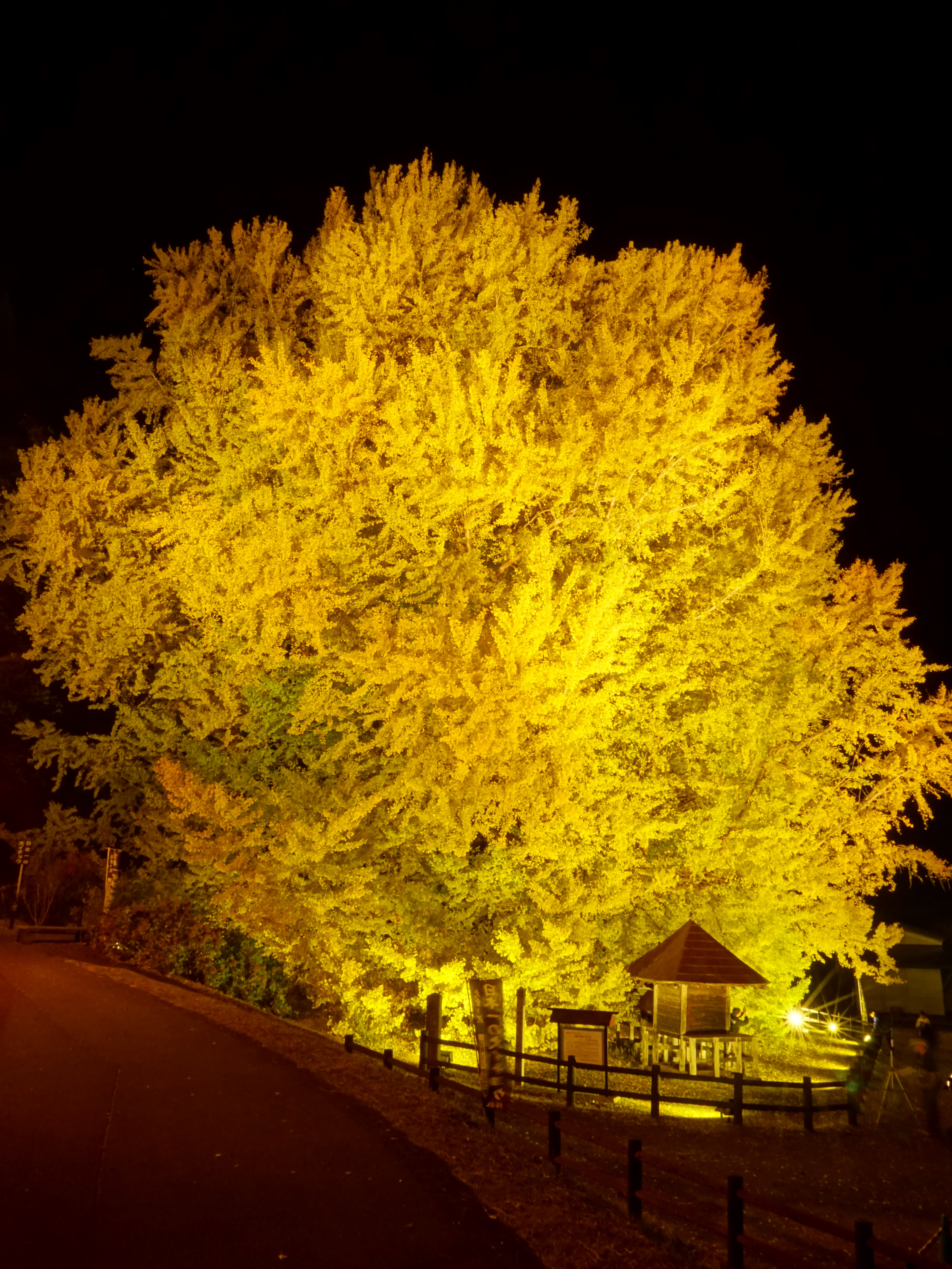 青森県西津軽郡深浦町にある北金ヶ沢のイチョウ。垂乳根のイチョウとも呼ばれ、太さ日本一のイチョウの巨樹である。黄葉の時期は夜間ライトアップが行われる。